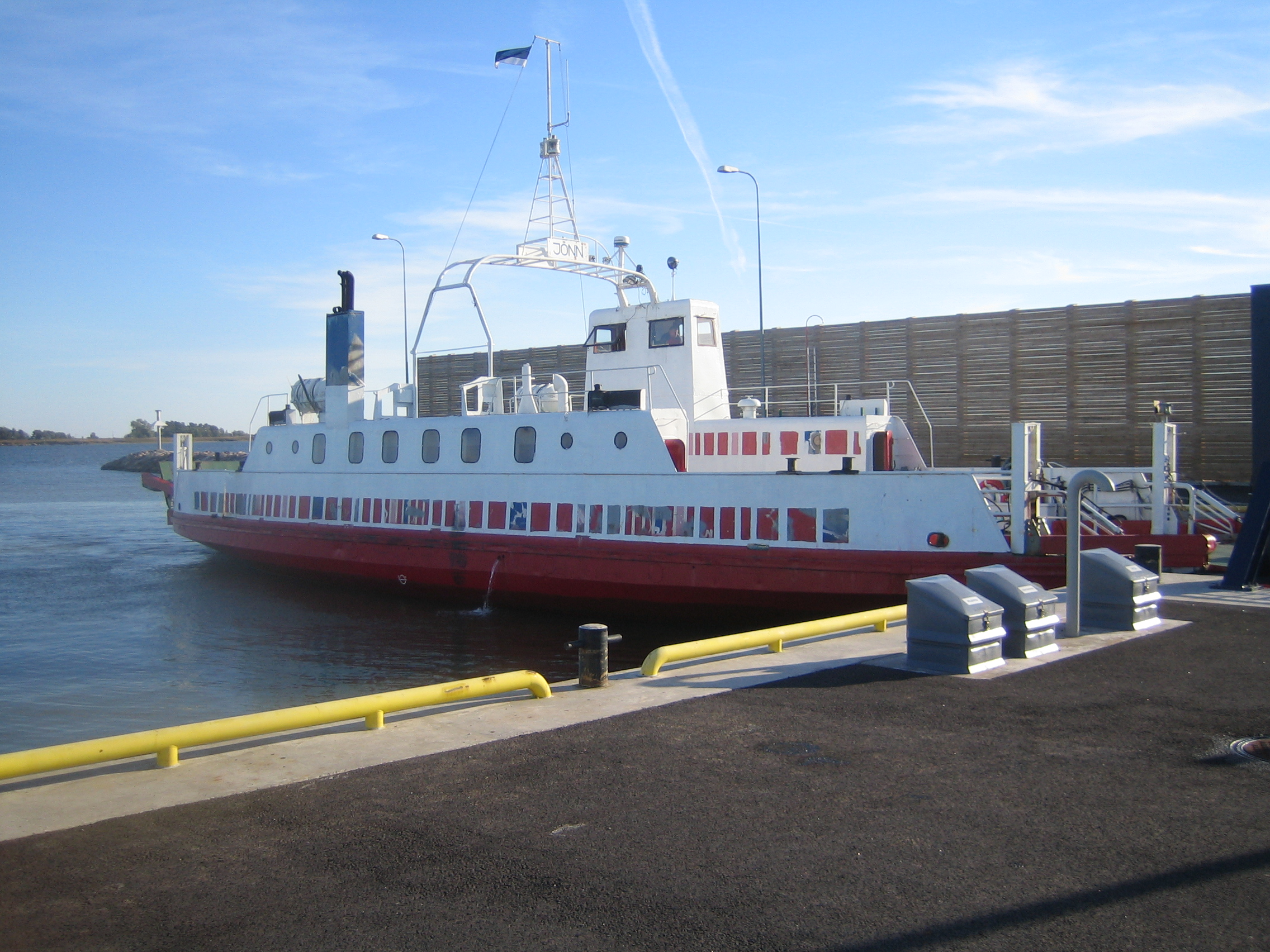 Parvlaev Jõnn